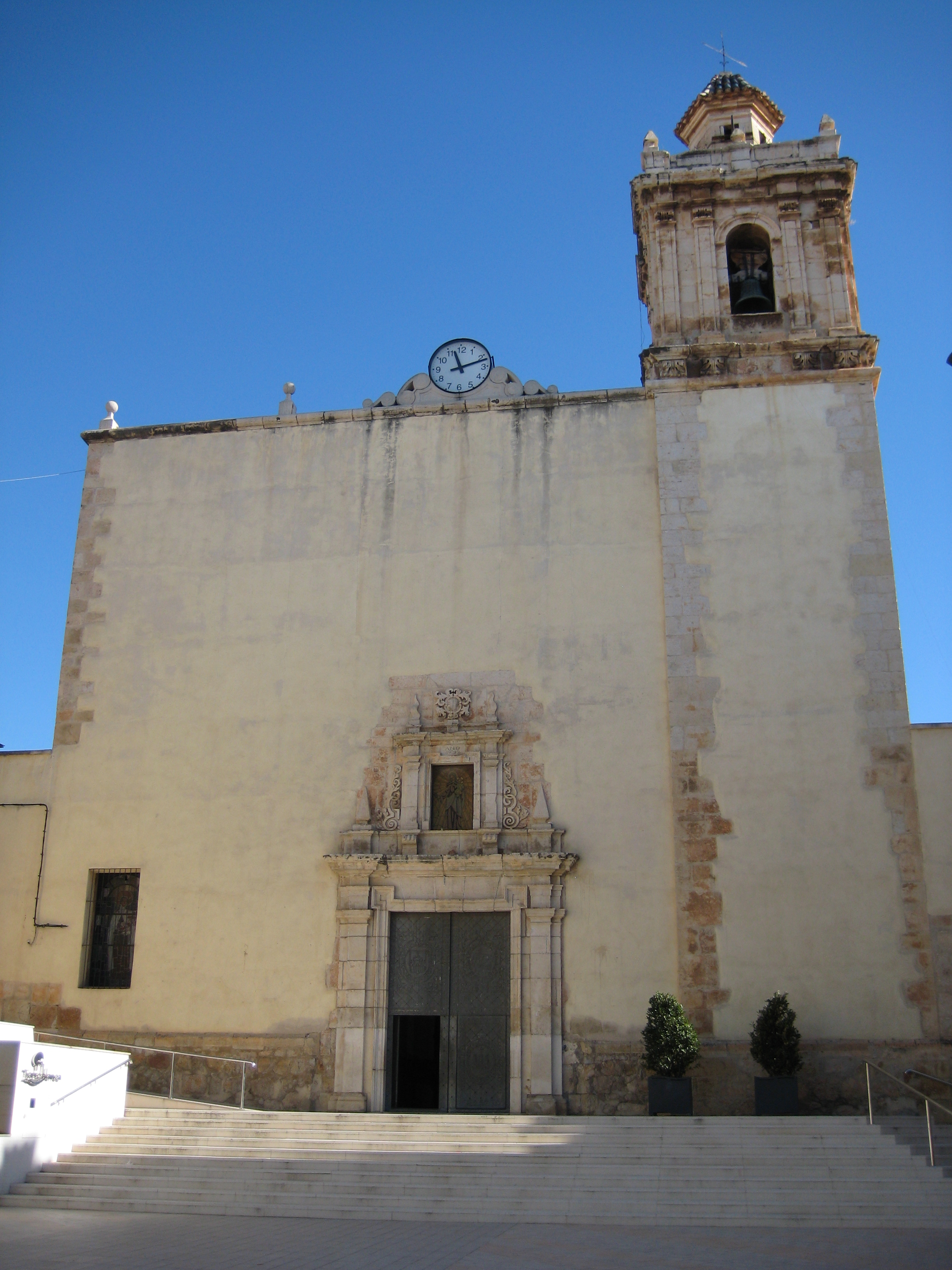 Façana de l'església de Sant Bartomeu de Torreblanca (Plana Alta)